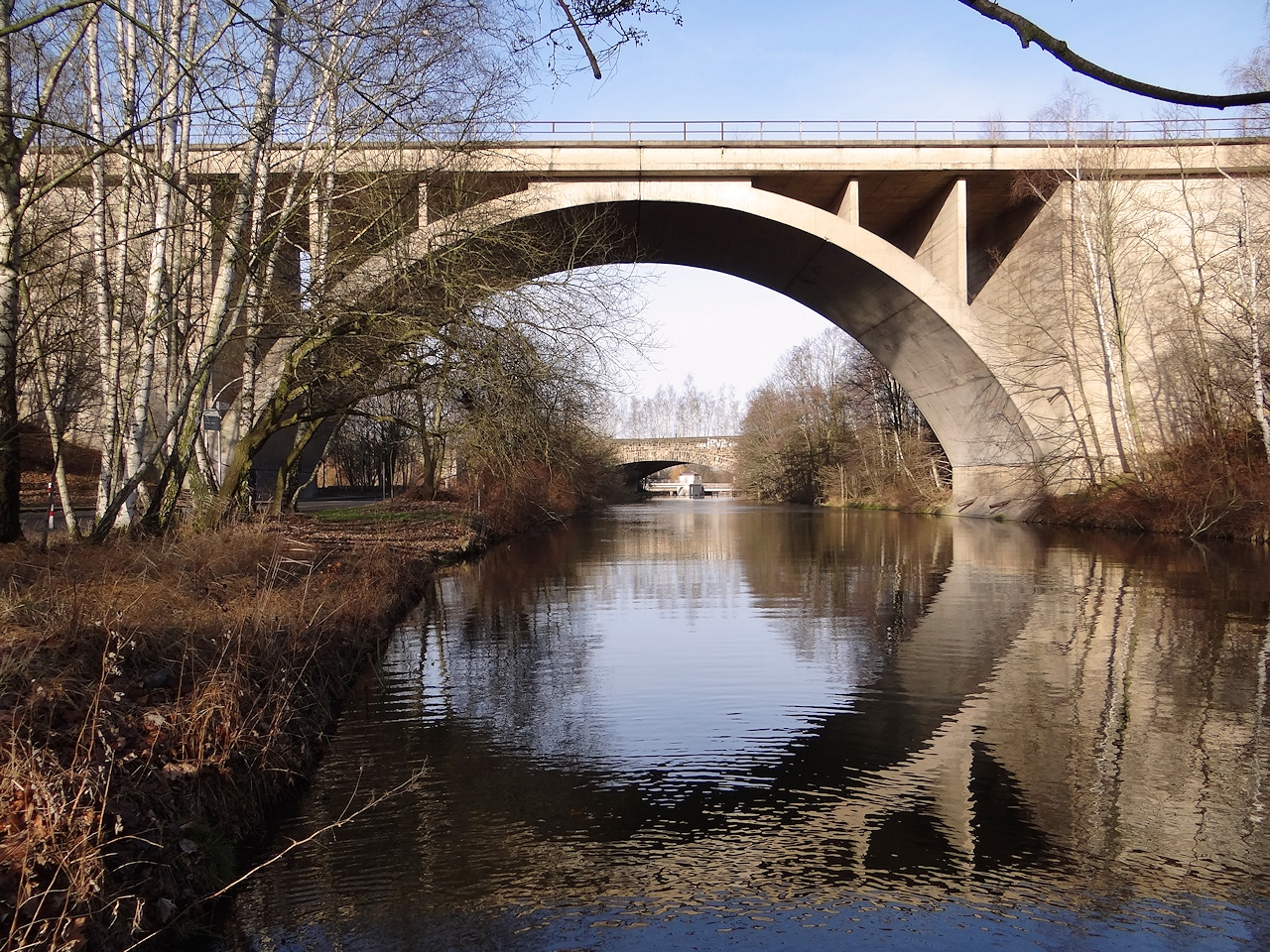 Eisenbahnbrücke für den früheren Einfahrtbereich zum Braunschweiger Rangierbahnhof, so genannte Echobrücke, von Süden. Im Hintergrund die weiteren Eisenbahnbrücken bei Eisenbüttel.